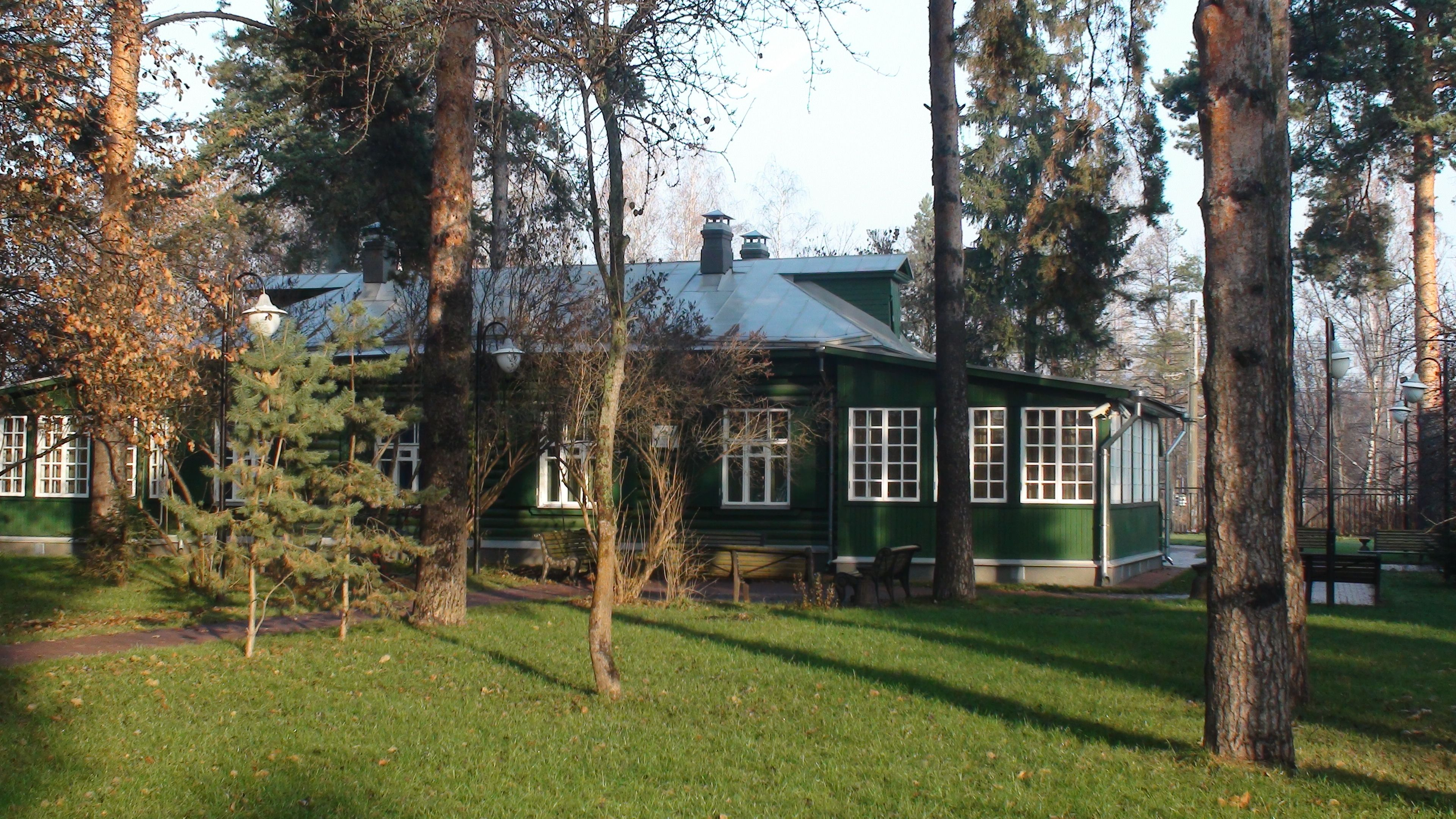 Музей М. Цветаевой в Болшево